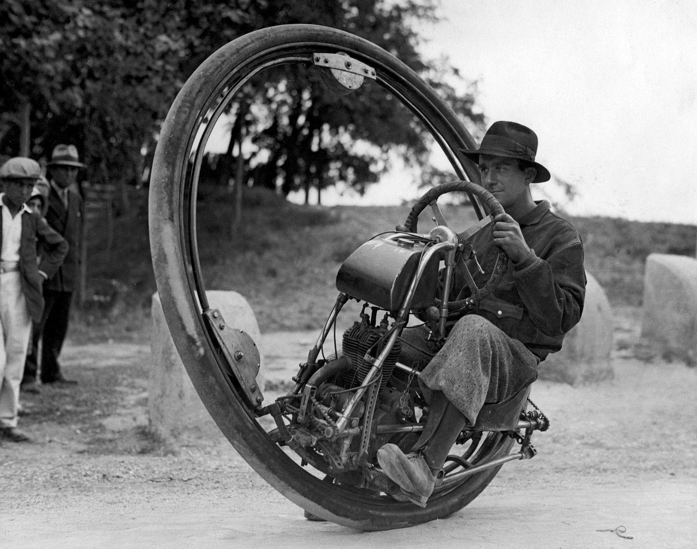 La Motoruota di Cislaghi & Govetosa, versione con motore Garelli 350, nella seconda metà degli anni '20 Nationaal Archief / Spaarnestad Photo / Het Leven / Fotograaf onbekend, SFA001006706. Gemotoriseerde ��nwieler (een uitvinding van de Italiaan M. Goventosa de Udine) die een snelheid van 150 kilometer per uur kan halen. 1931 One wheel motorcycle (invented by Italian M. Goventosa de Udine). Maximum speed: 150 kilometers per hour ( 93 Mph). Collectie Spaarnestad Voor meer informatie en voor meer foto?s uit de collectie van Spaarnestad Photo, bezoek onze Beeldbank: U kunt ons helpen onze kennis van de fotocollecties te verrijken door tags en commentaren toe te voegen. Herkent u mensen of locaties of heeft u een bijzonder verhaal te vertellen bij ��n van de foto?s, laat dan een reactie achter (als u ingelogd bent bij Flickr) of stuur een mailtje naar: You can help us gain more knowledge on the content of our collection by simply adding a comment with information. If you do not wish to log in, you can write an e-mail to